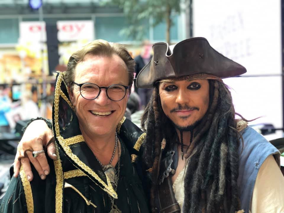 Michael Rouven als Jack Sparrow mit Wolfgang Lippert